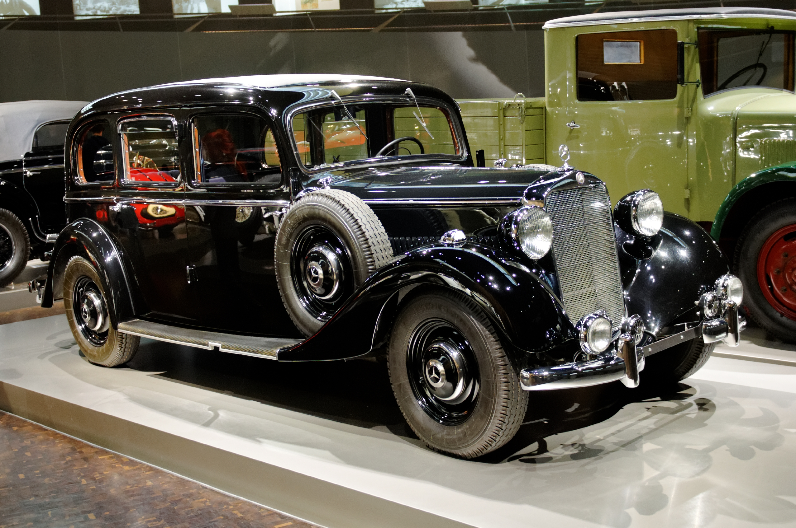 Bilder aus dem Mercedes-Benz-Museum 2015